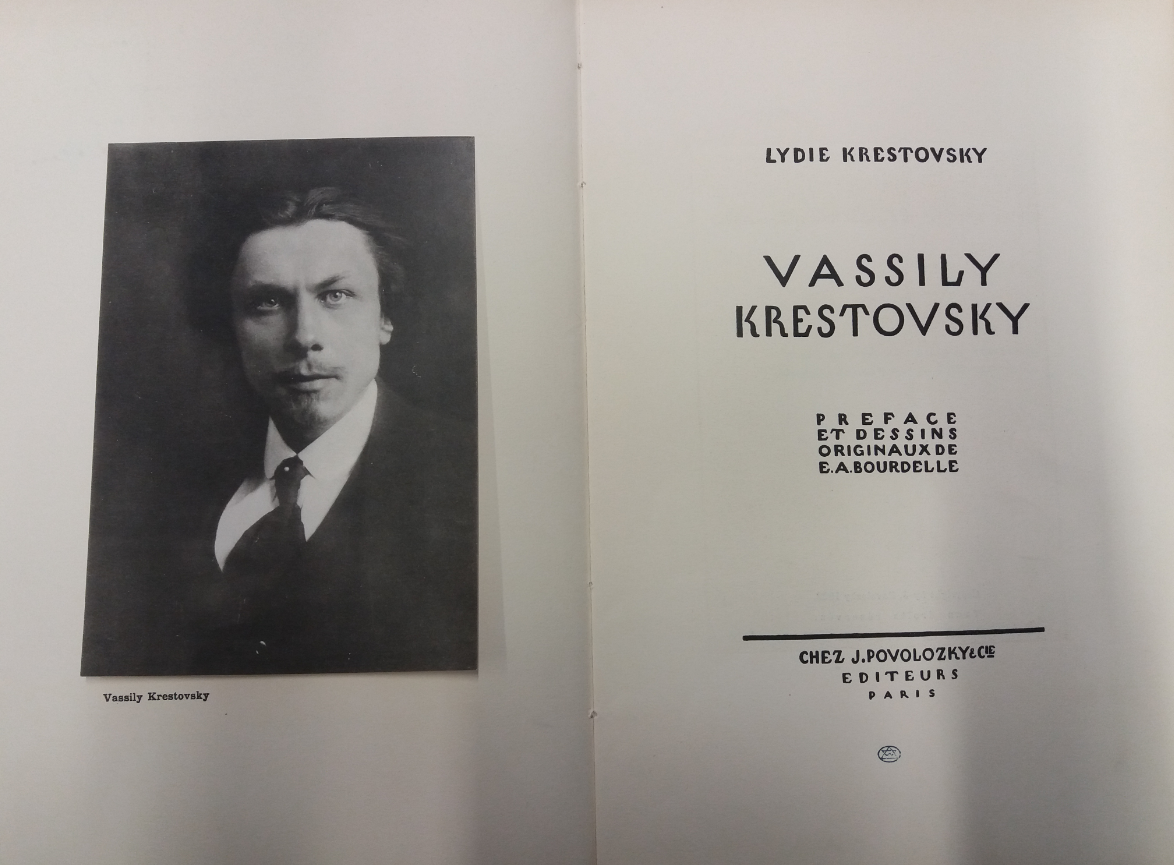 Frontispice de l'ouvrage de Lydie Krestovsky, épouse de Vassily Krestovsky ("Vassily Krestovsky", préface et dessins originaux de E.A. Bourdelle, Paris, J. Povolozky, 1922), à gauche le portrait de Vassily Krestovsky et à droite la page de garde.